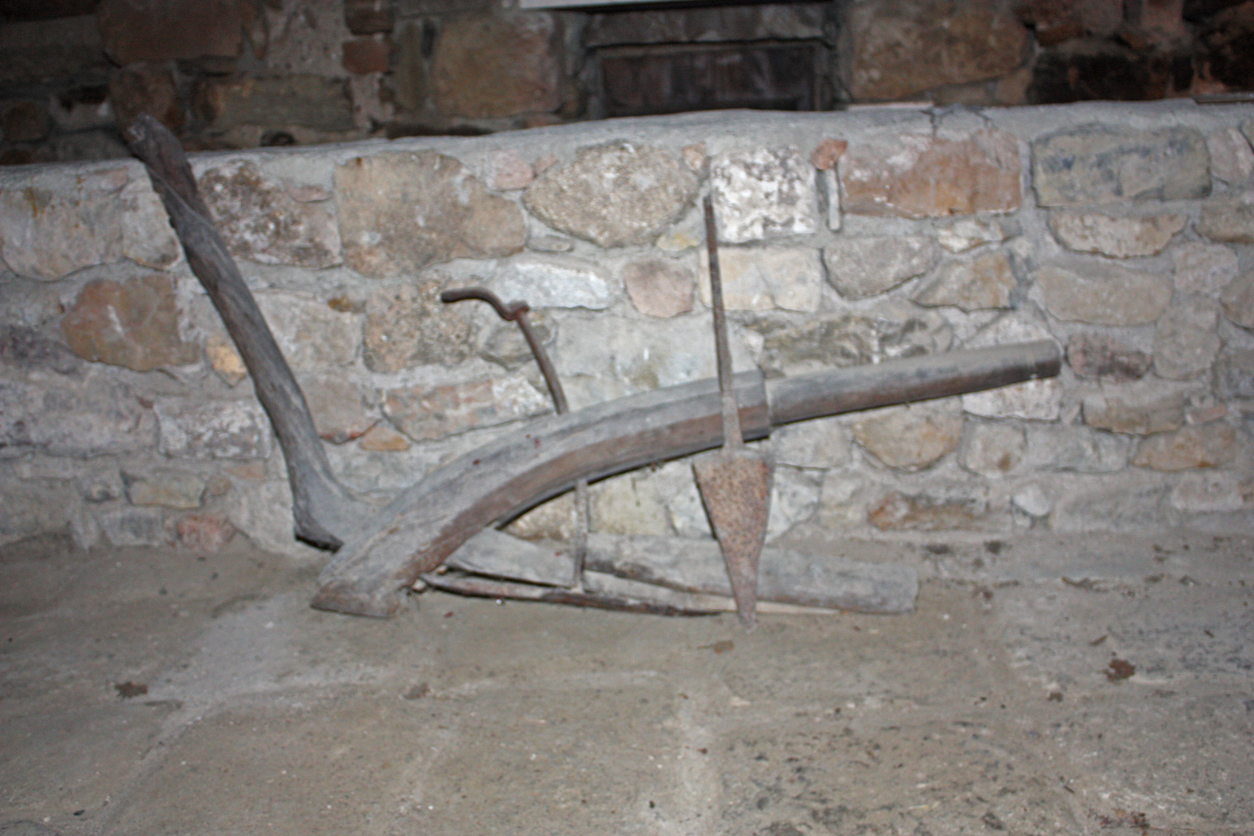 Dans le salle de Garde, on peut voir une très ancienne araire : reille de forme lancéolée, à longue tige de section quadrangulaire, soc plat, sans versoir pour retourner la terre. Elle est accompagnée de son brancart, pour un âne ou un petit mulet, qui vient s' articuler sur le timon cylindrique.